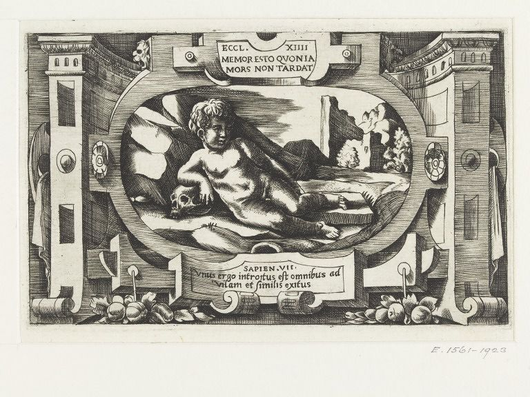 gravure